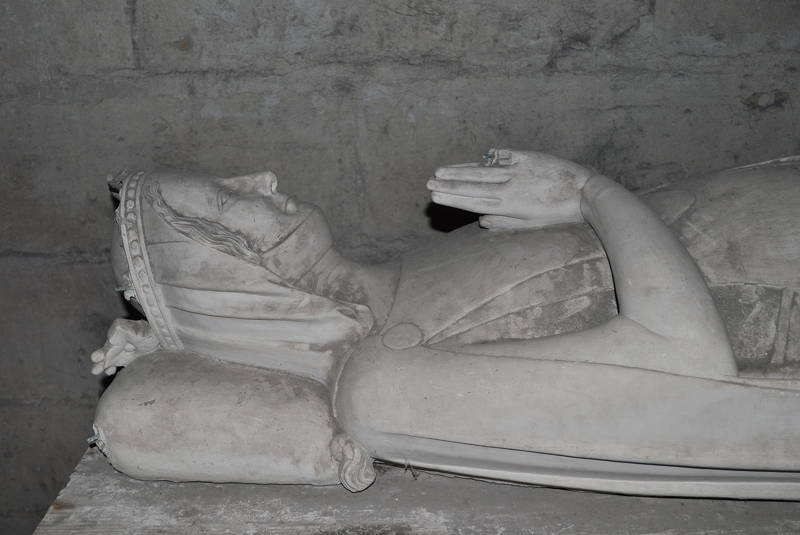 Beatrix Burgundská